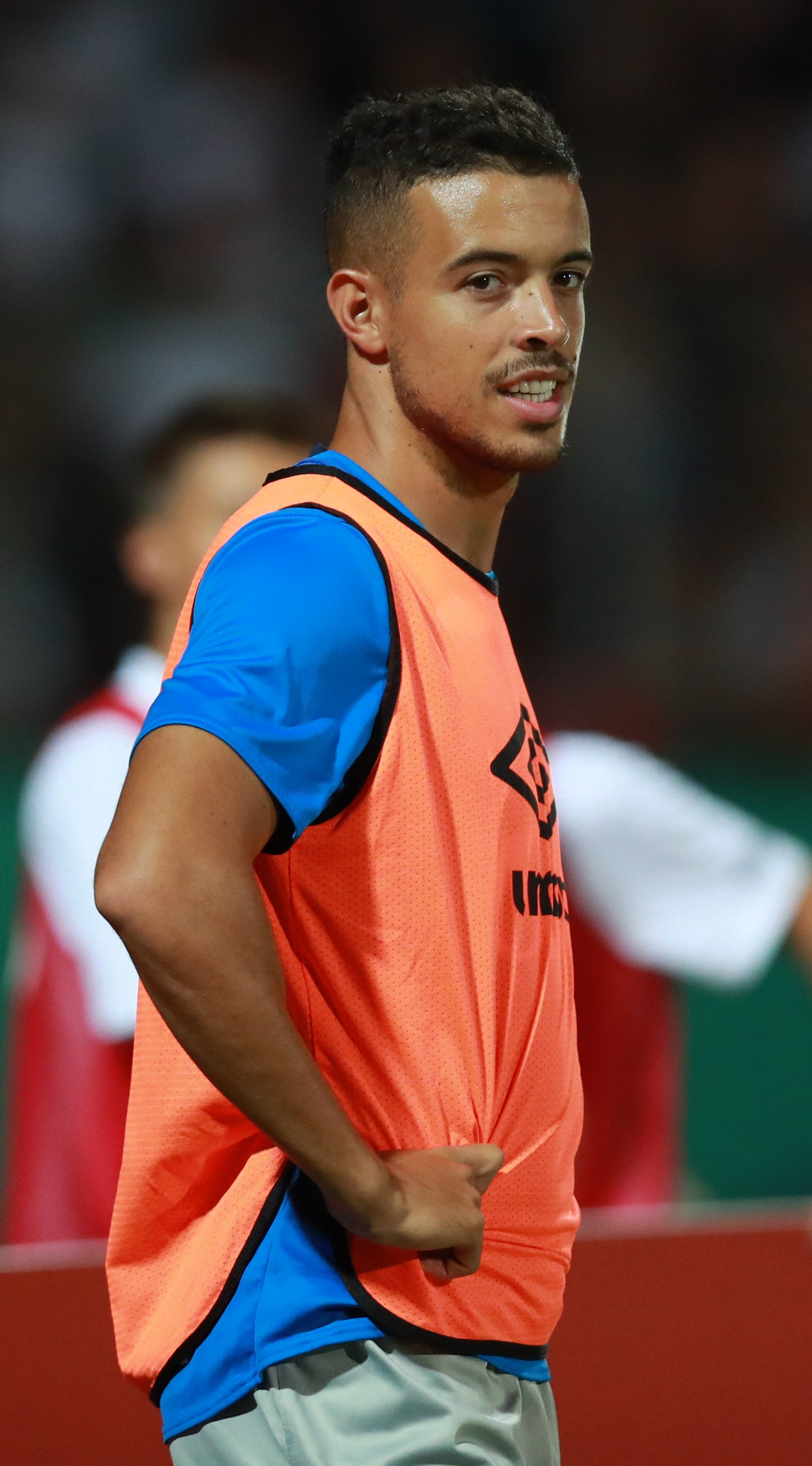 DFB-Pokal 2018/19, 1. Hauptrunde: 1. FC Schweinfurt 05 gegen FC Schalke 04 0:2 (0:1)